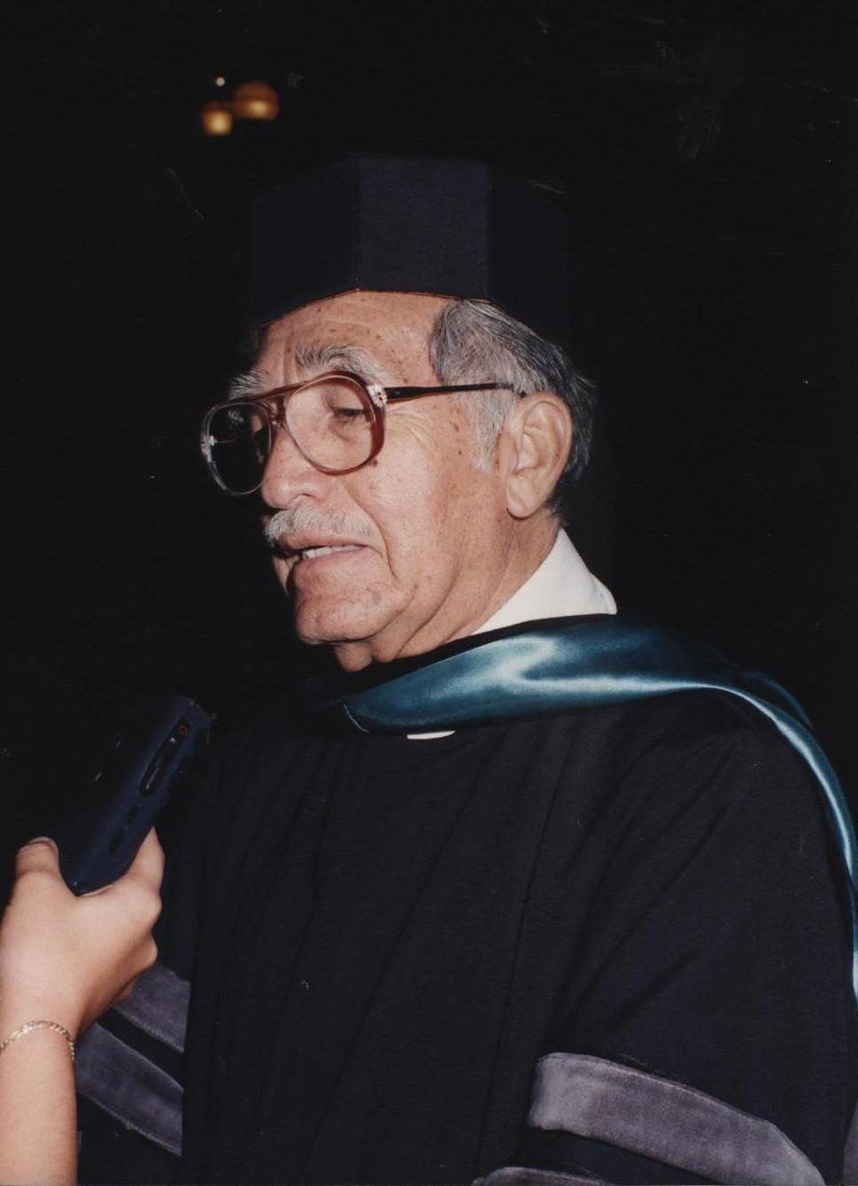 Emilio Herrera recibiendo su titulo Honoris Causa por parte de la Universidad Autonoma de la Laguna, México.